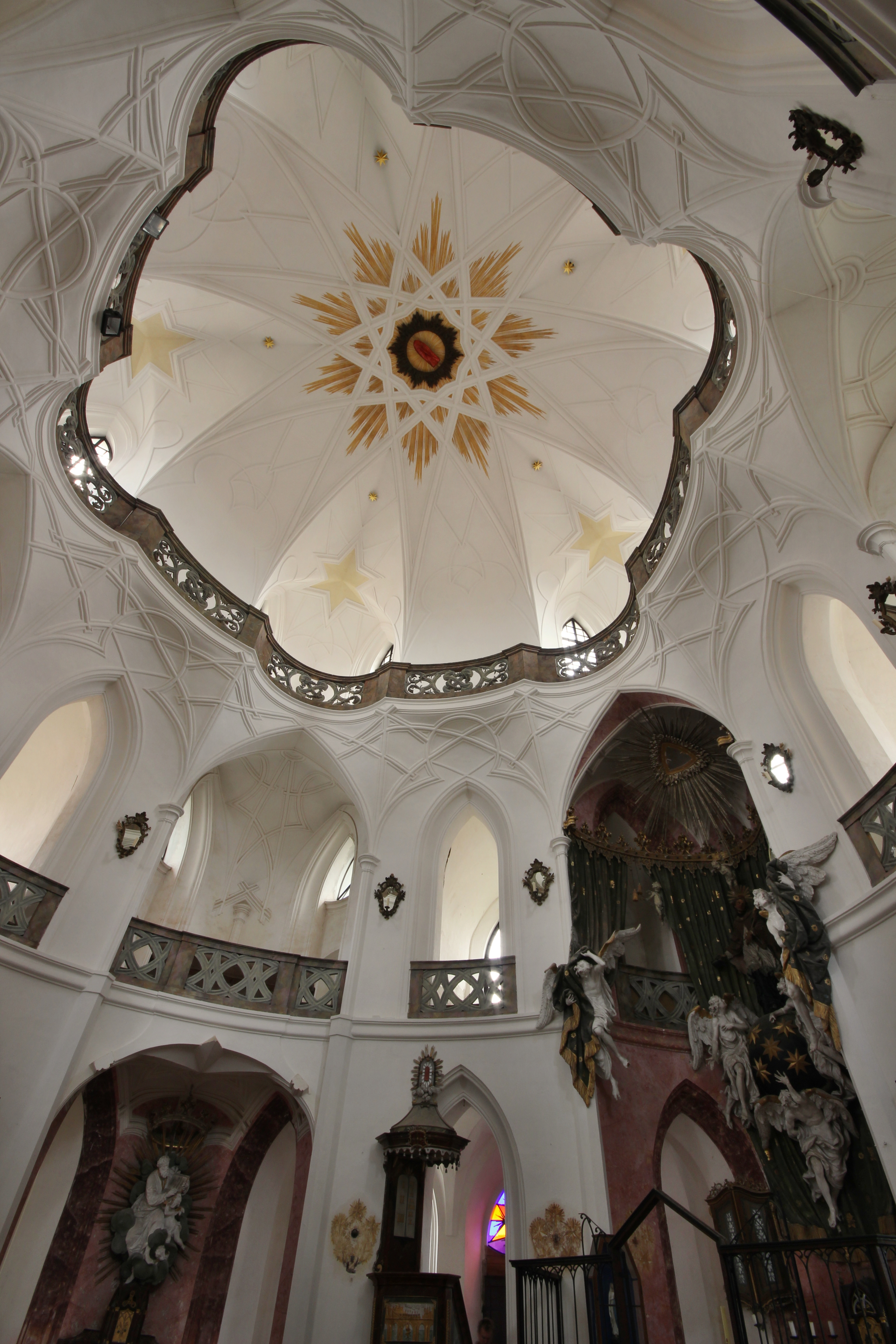 Poutní kostel sv. Jana Nepomuckého na Zelené hoře.